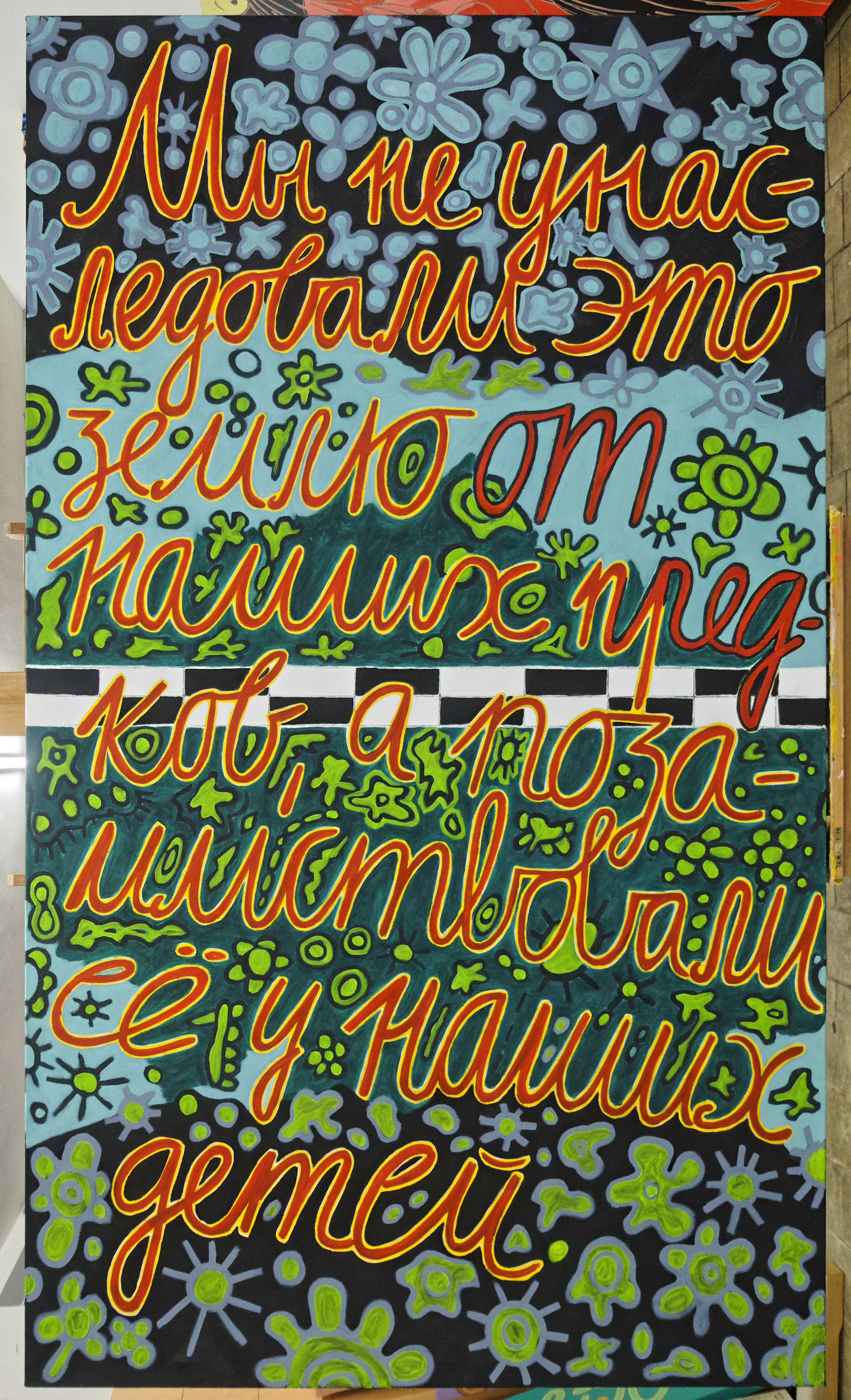 Bilder aus der Galerie von Eva Bur am Orde 2020 mit dem Schwerpunkt ornamentaler und figurativer Darstellungen.